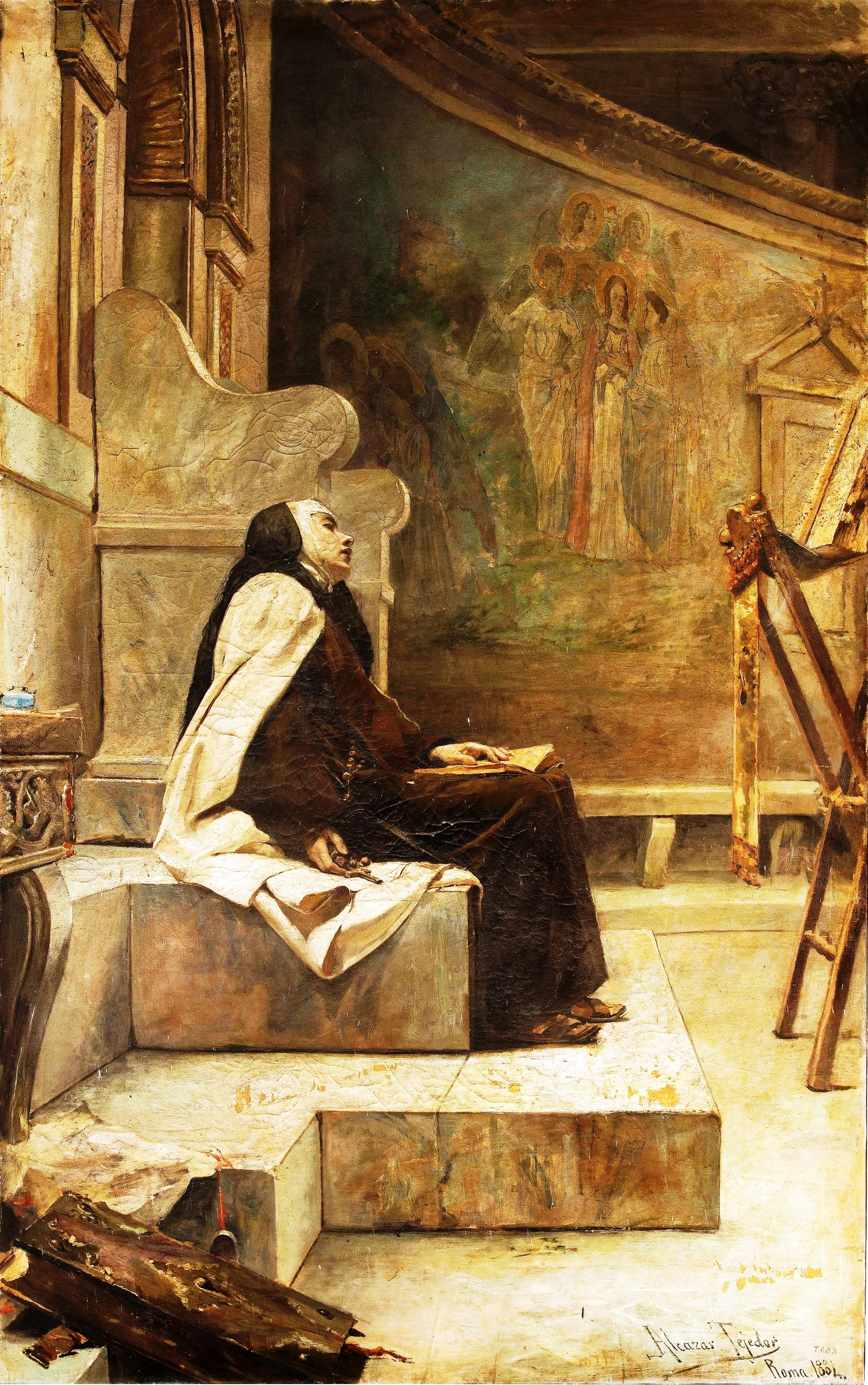 La obra representa a la mística española Santa Teresa de Jesús (1515-1582) en actitud extasiada.